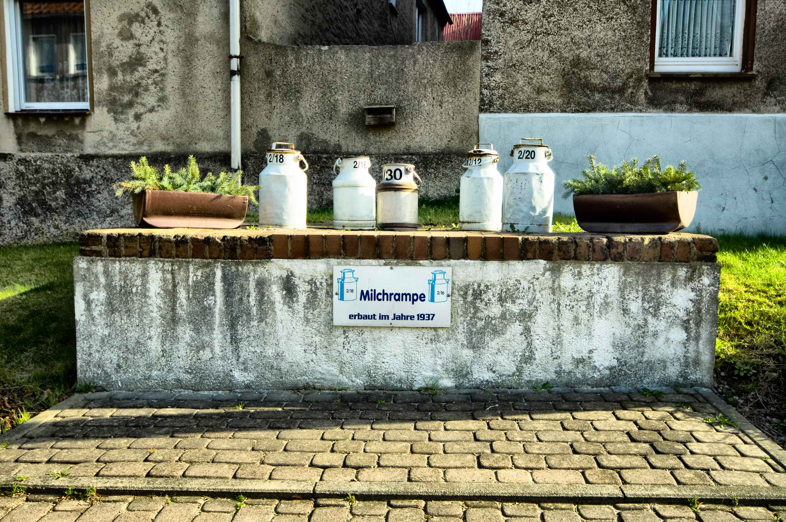 Die historische Milchrampe von Malkwitz, Ortsteil von Wermsdorf in Sachsen, Stephan Komp